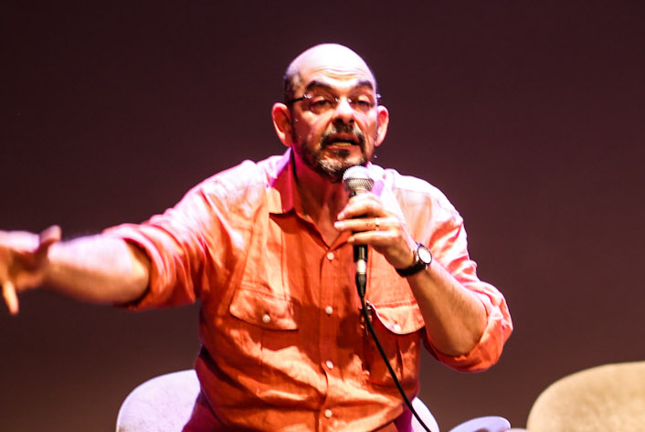 Sessão e bate papo com a presença de Laerte Coutinho e João W. Nery. São Paulo (SP) (CC BY-SA) Fora do Eixo